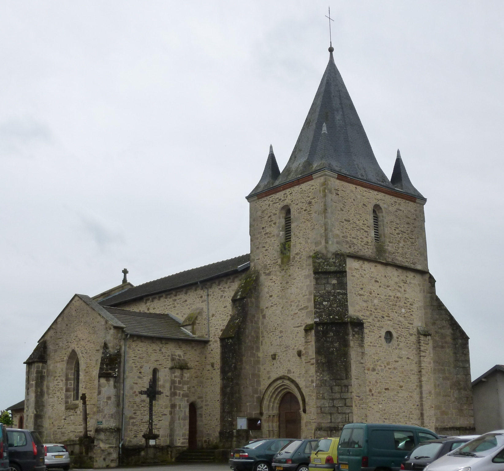 Eglise de Séreilhac